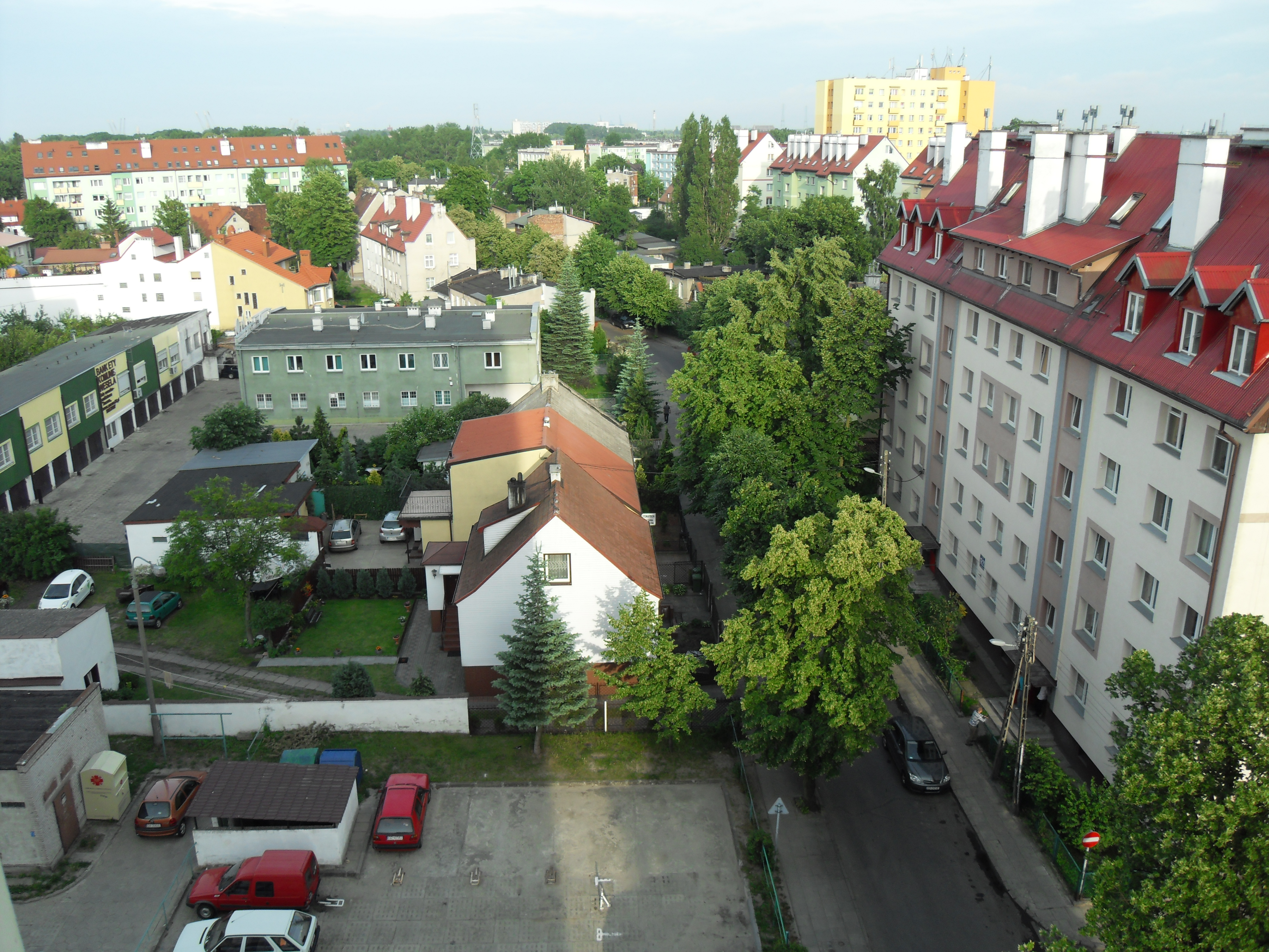 Gdańsk Brzeźno, ul. Korzeniowskiego.